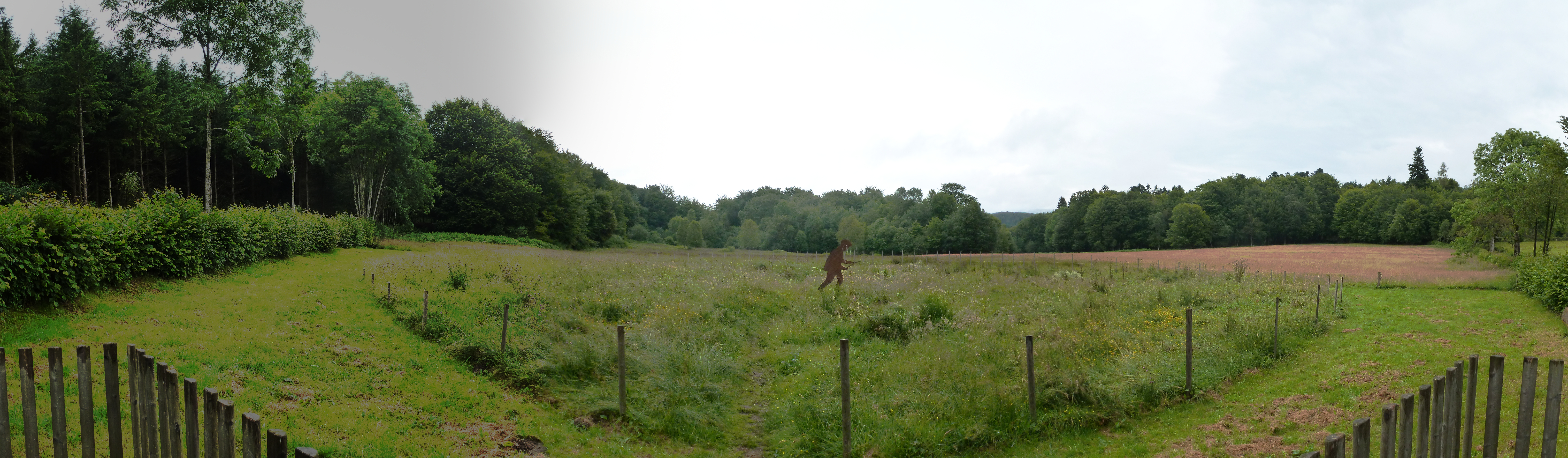 Tourbière de la source de l'Yonne, sur le Mont Préneley, près de Glux-en-Glenne (Nièvre, Bourgogne, France)